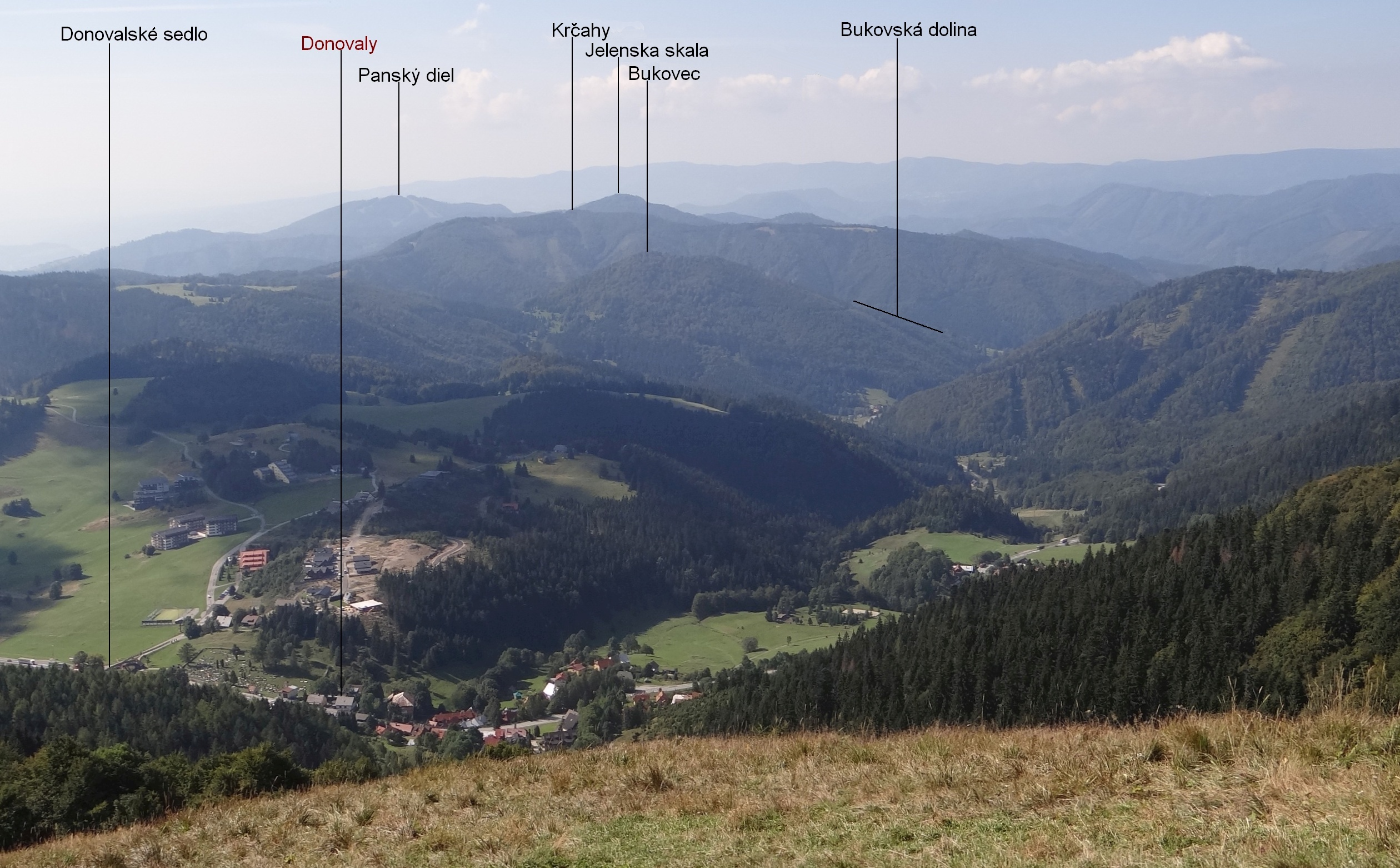 View fron Nová hoľa